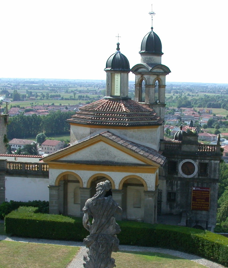 La Chiesa di San Giorgo di Monselice